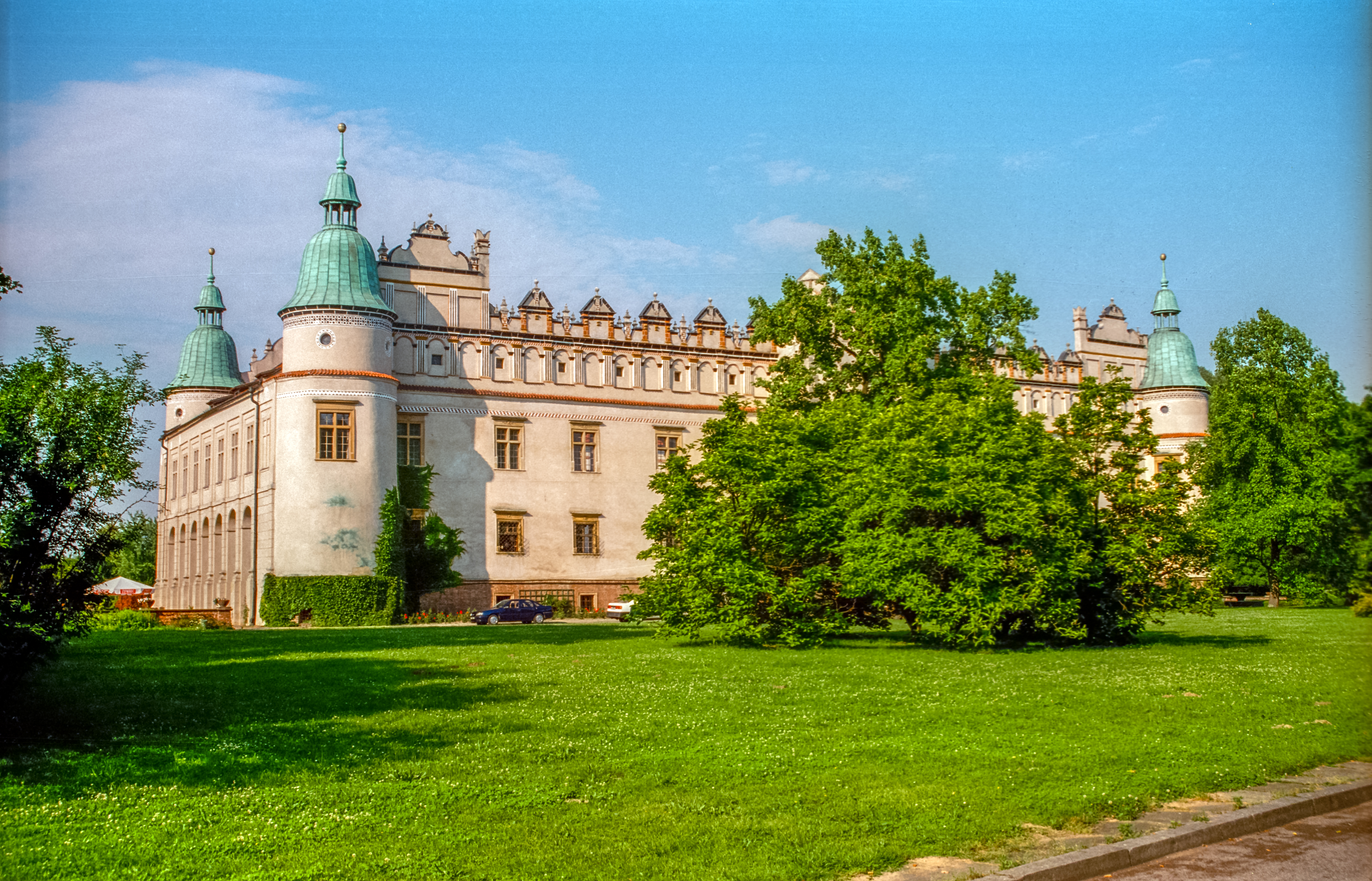 Baranów Sandomierski Castle